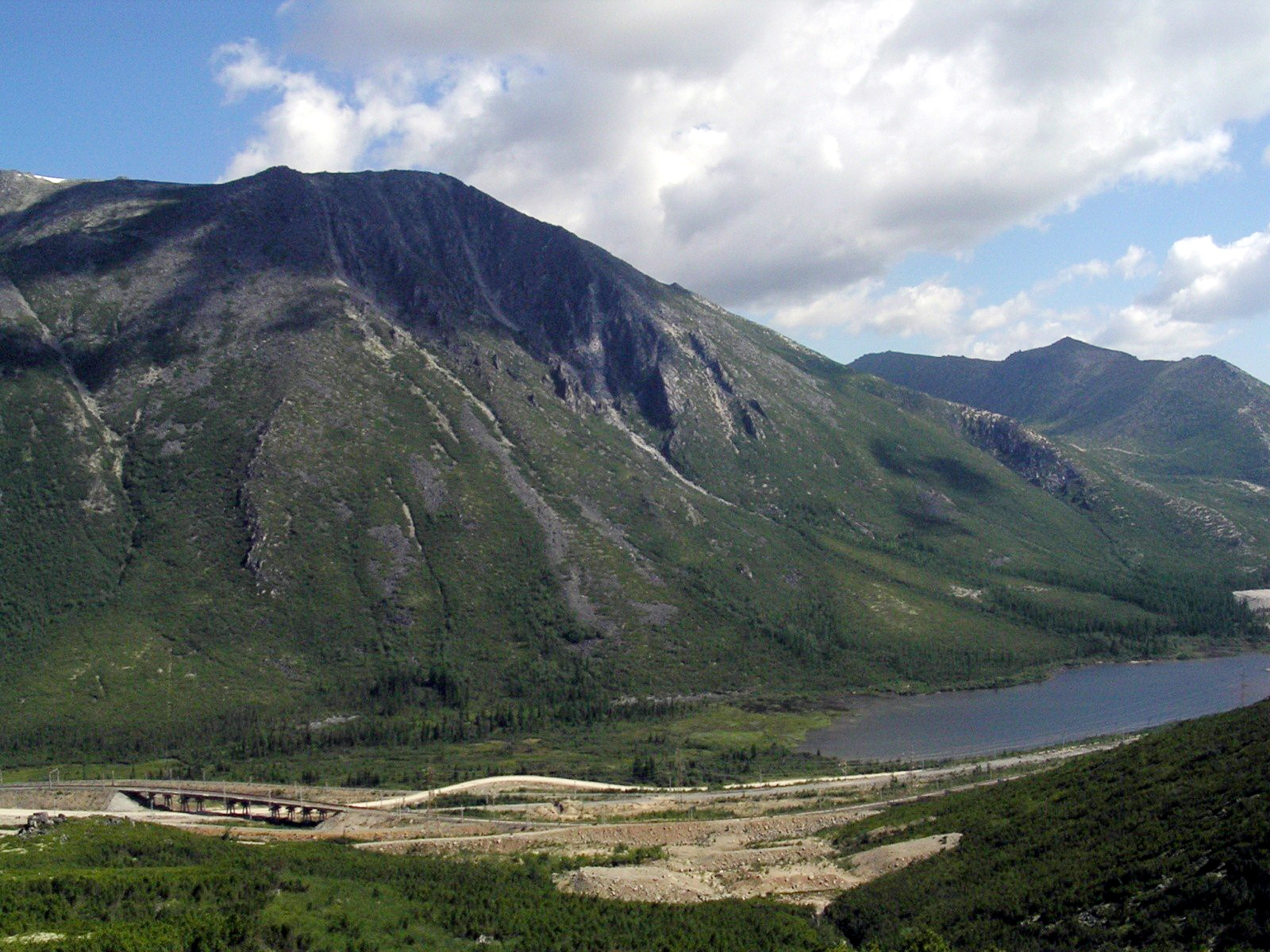 Перевальные озёра на Северомуйском обходе БАМа